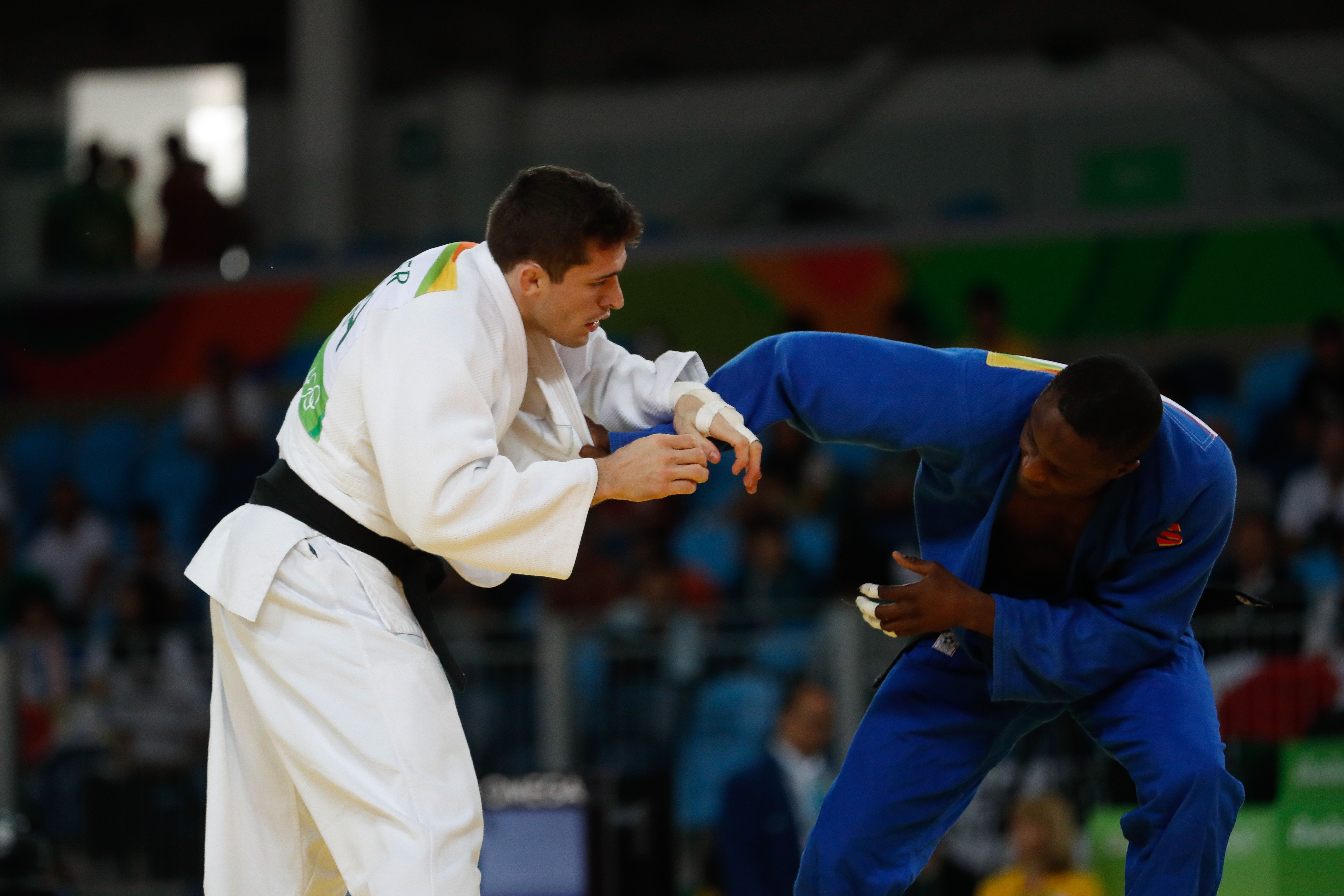 Judô na Arena Carioca dos Jogos Olímpicos Rio 2016. Rio de Janeiro - Victor Penalber, do Brasil, vence Marlon August, de Moçambique, na categoria masculina 81kg do Judô na Arena Carioca dos Jogos Olí­mpicos Rio 2016.